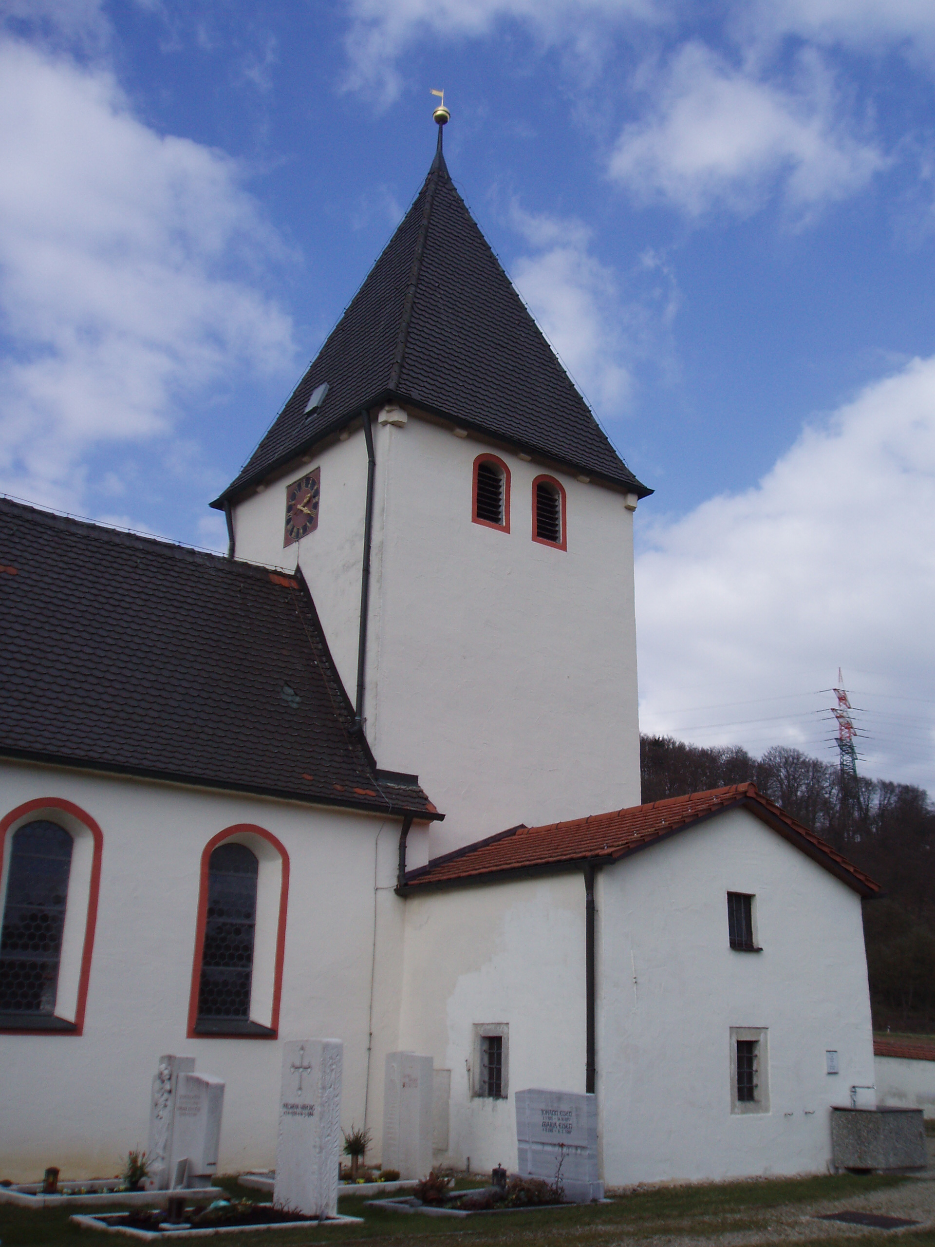 St._Martinskirche_Inching,_Landkreis_Eichstätt,_Gemeinde_Walting.